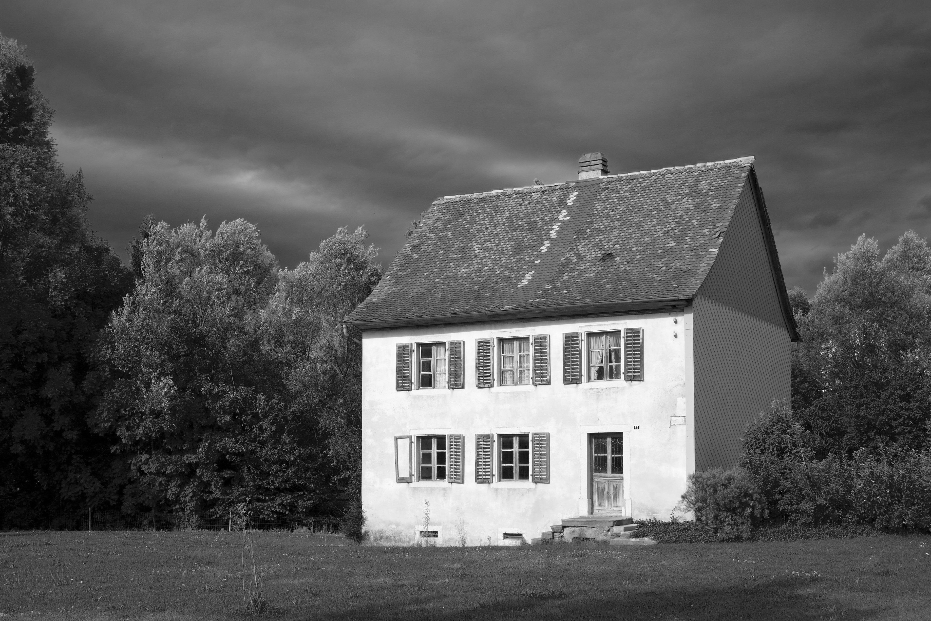 Baufälliges Wohnhaus am Dorfausgang von Courrendlin